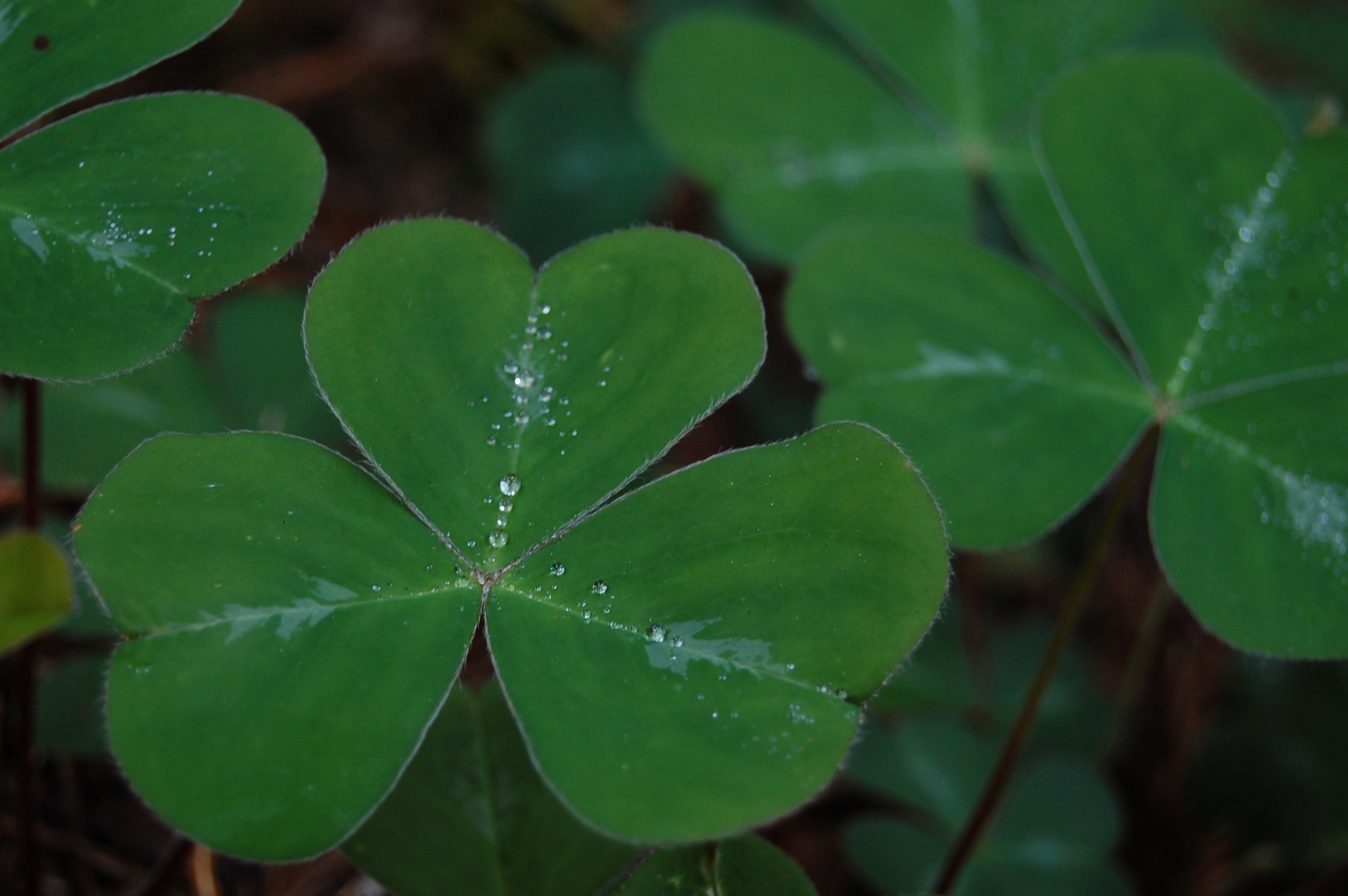 Oxalis acetosella